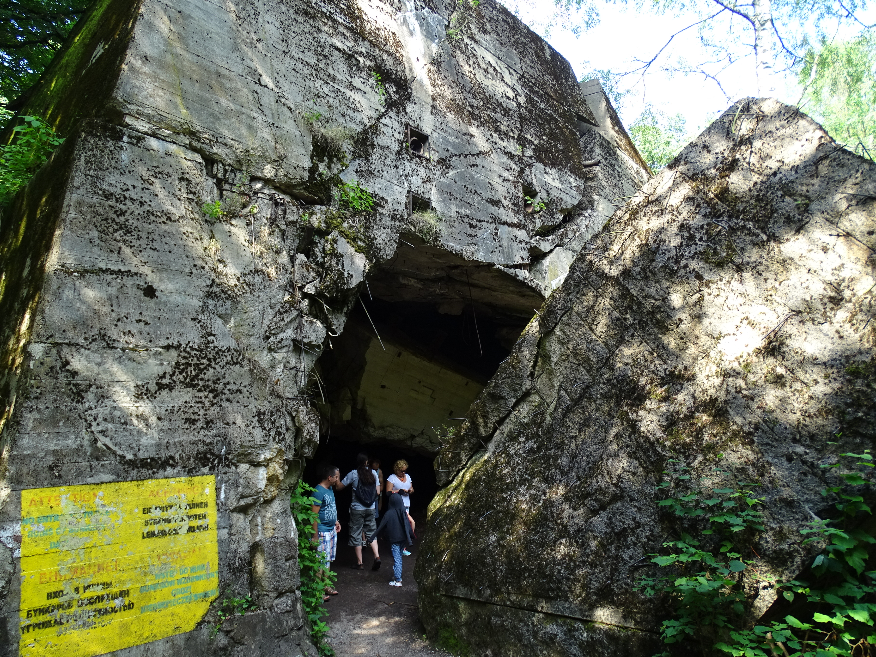 Goering's Bunker - Wolfsschanze (Wolf's Lair) - Hitler's Eastern Headquarters - Gierloz - Masuria - Poland - 04